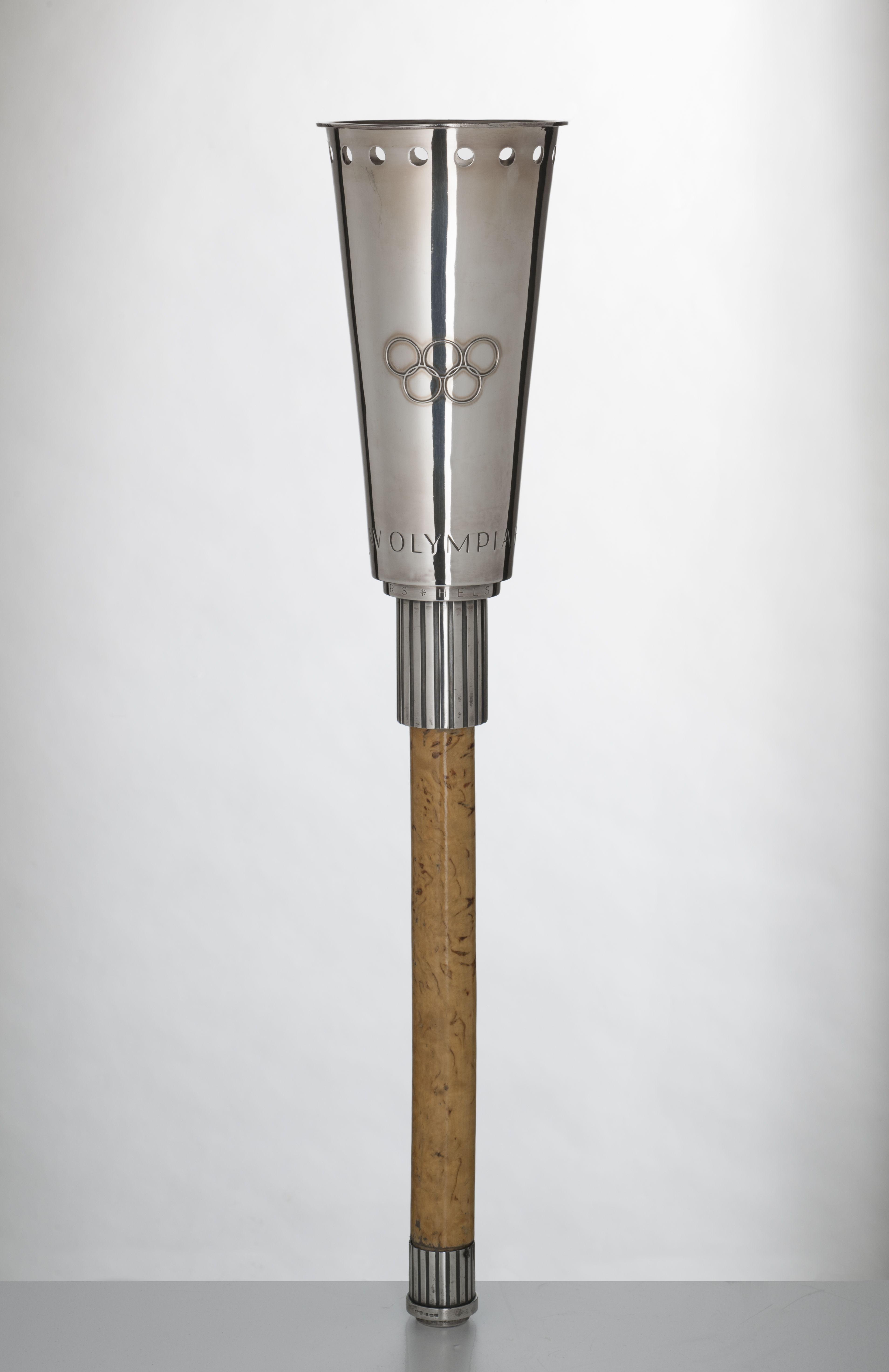 Helsingin olympiakisojen 1952 soihtu